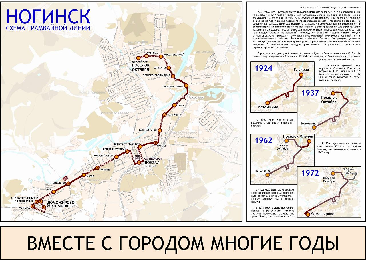 Трамвайная схема Ногинска для наклеивания в вагонах